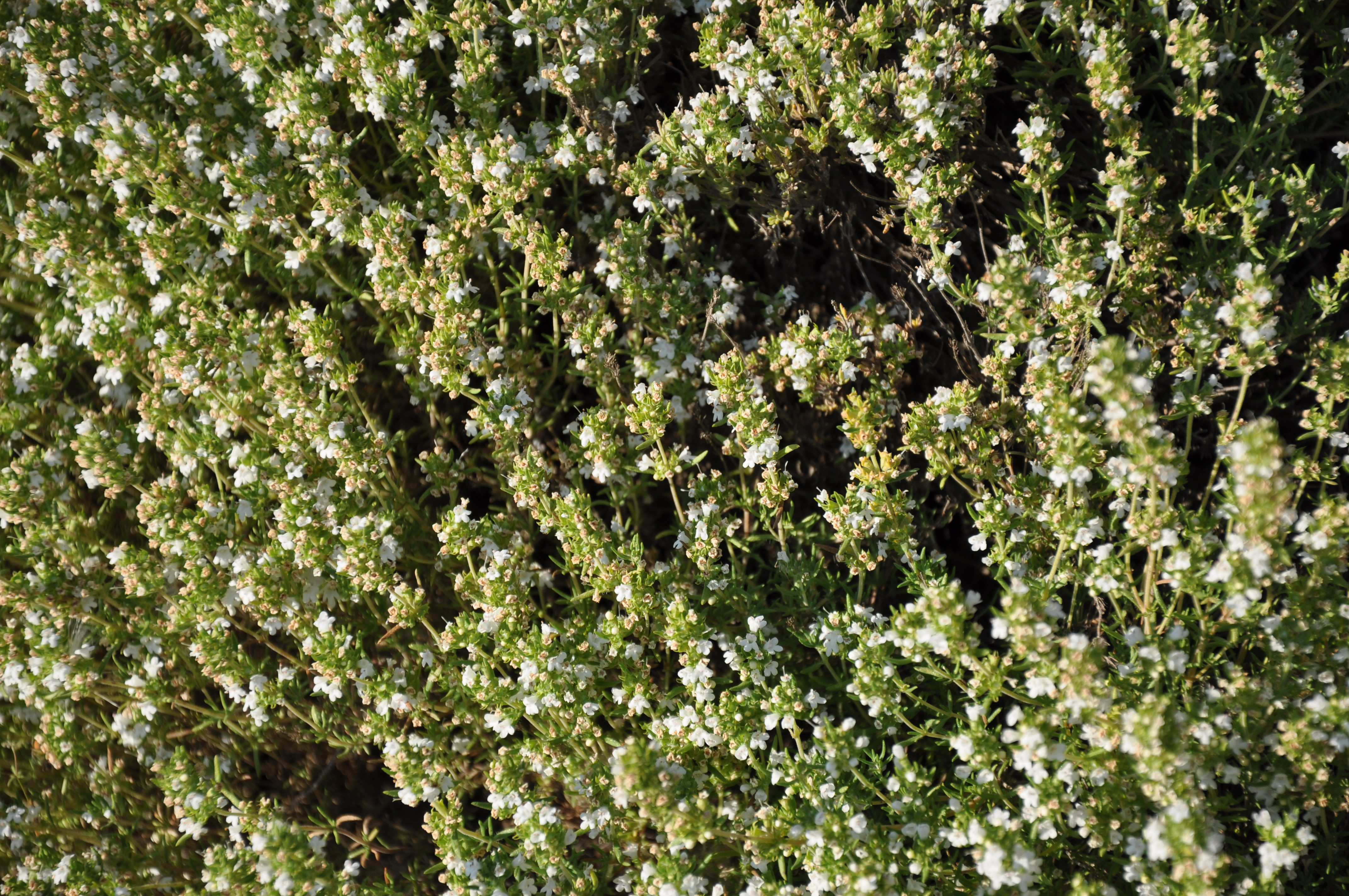 Tomillo salsero en la Sierra de Ávila, España